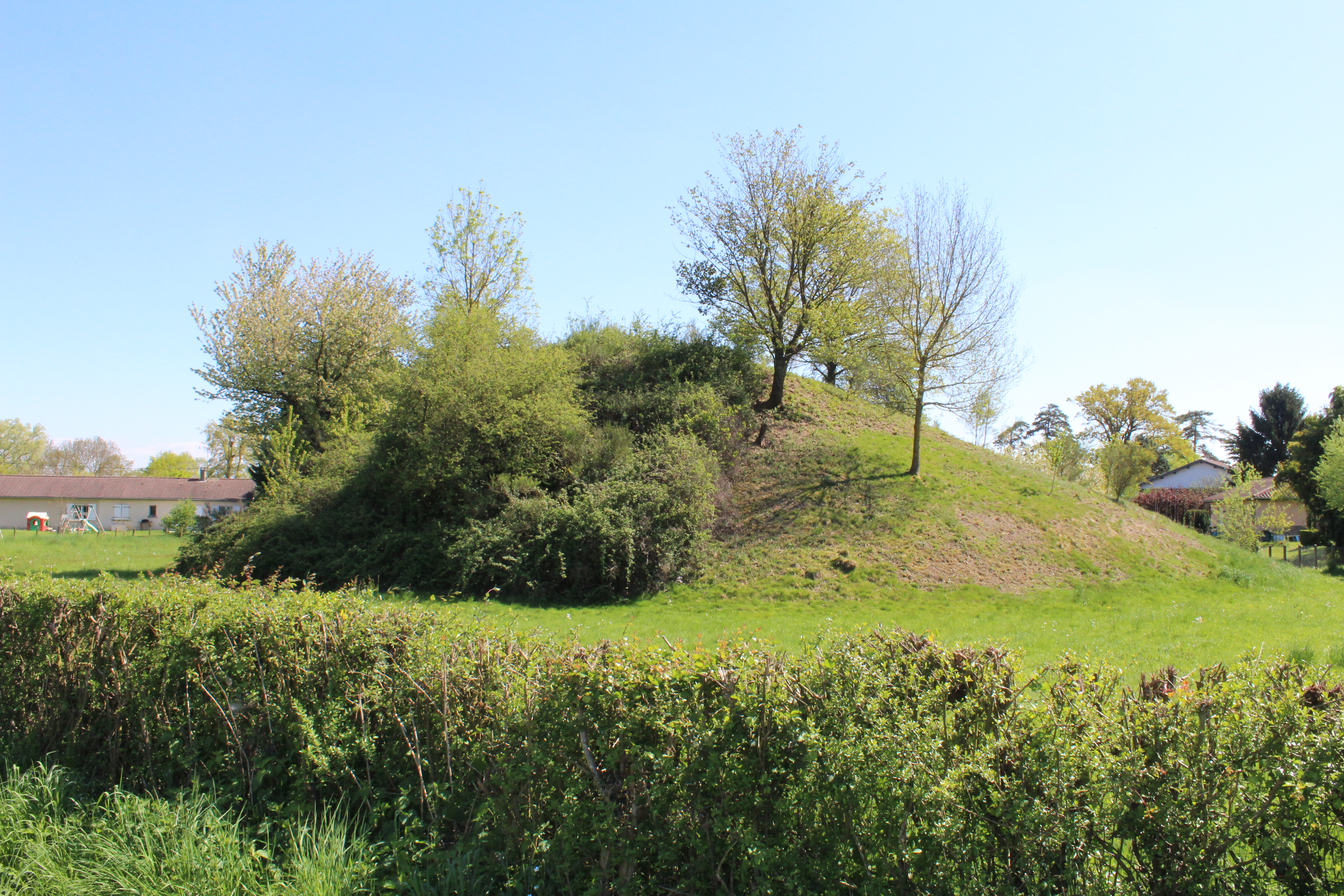 Vue sur le vestige de la poype de Saint-Cyr-sur-Menthon